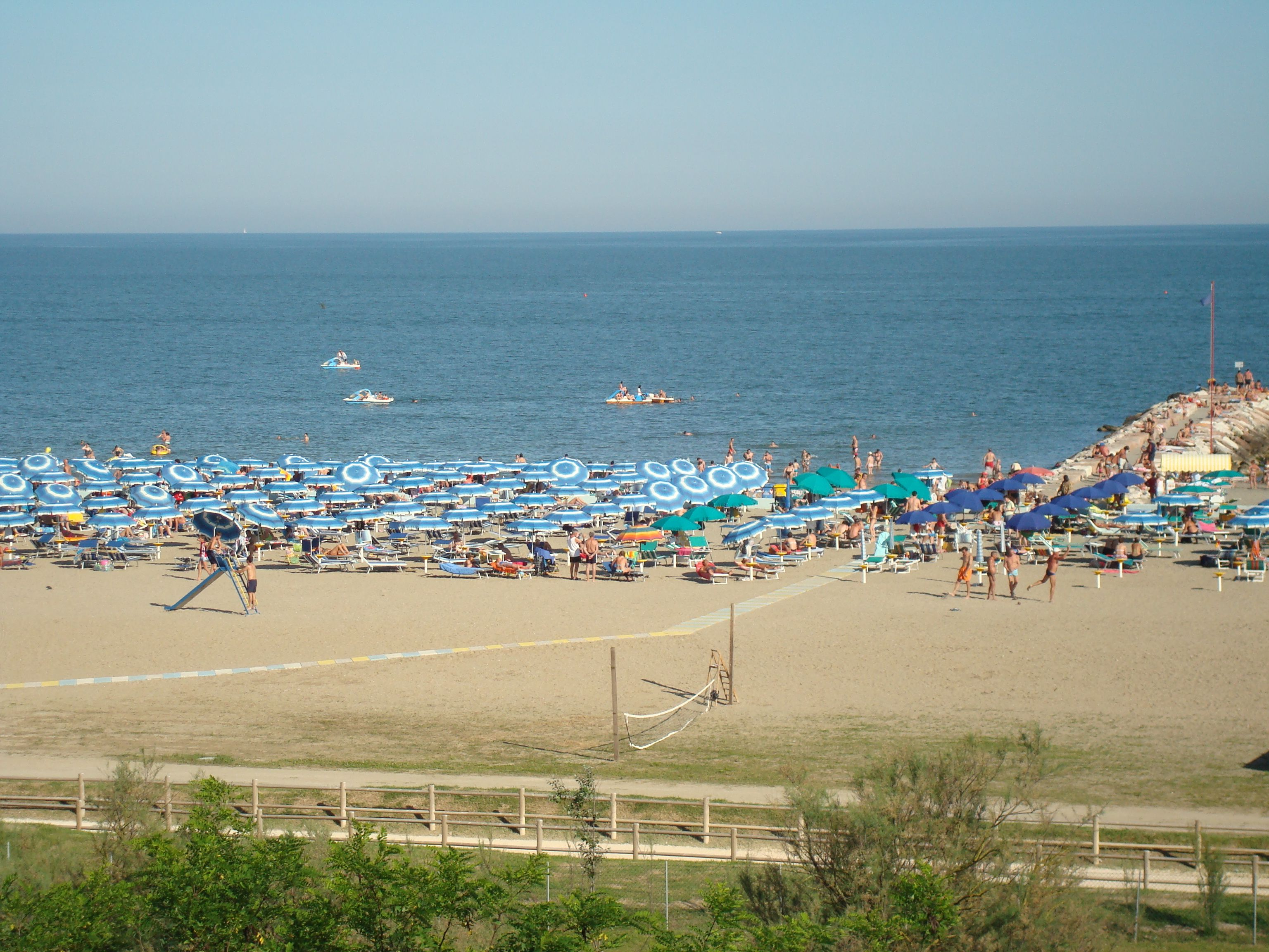 Foto della spiaggia di Eraclea vista dal tetto del park hotel pineta.